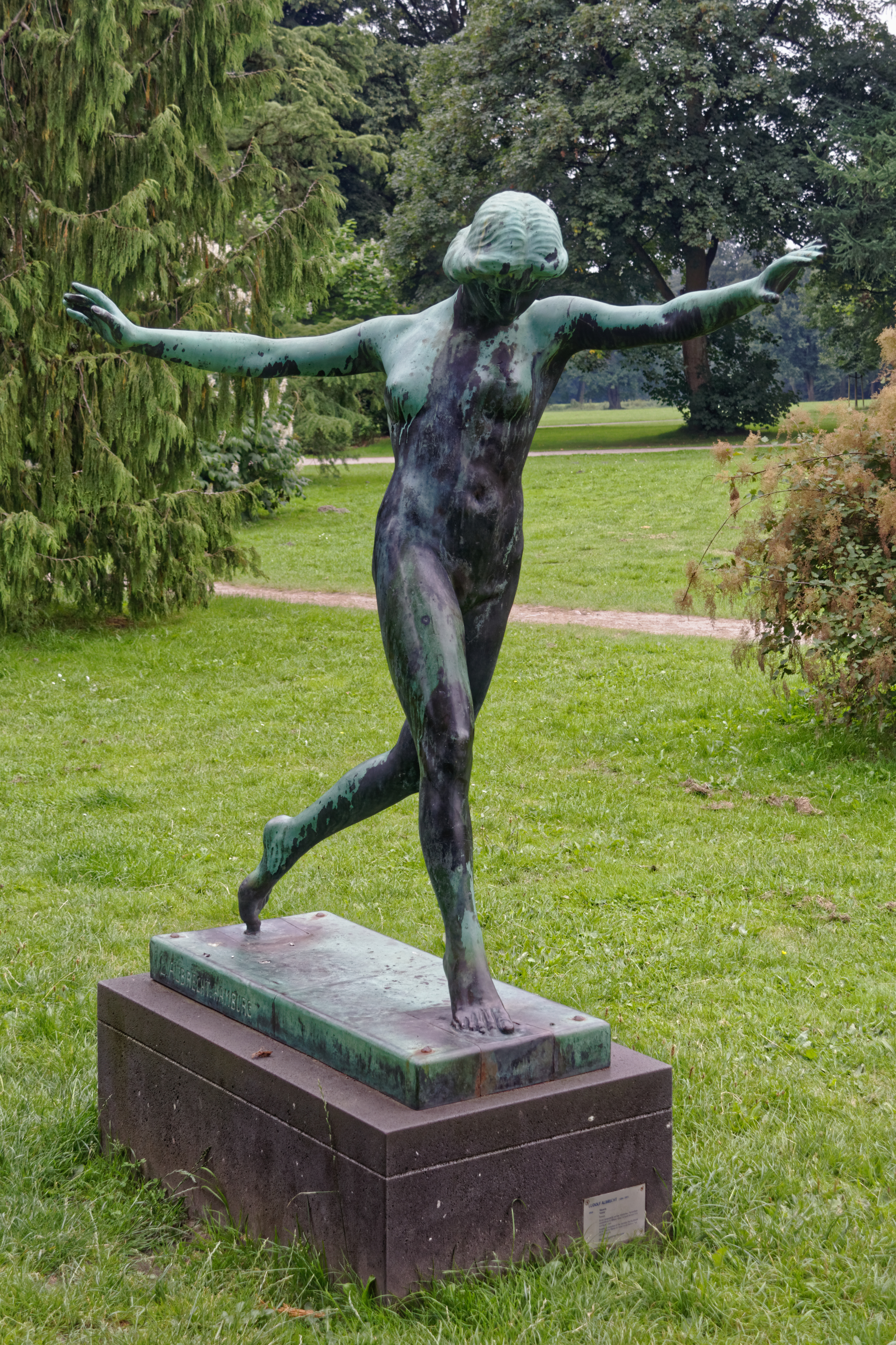 Hamburg-Othmarschen, Jenischpark, Statue "Tanzende"This is a photograph of an architectural monument.